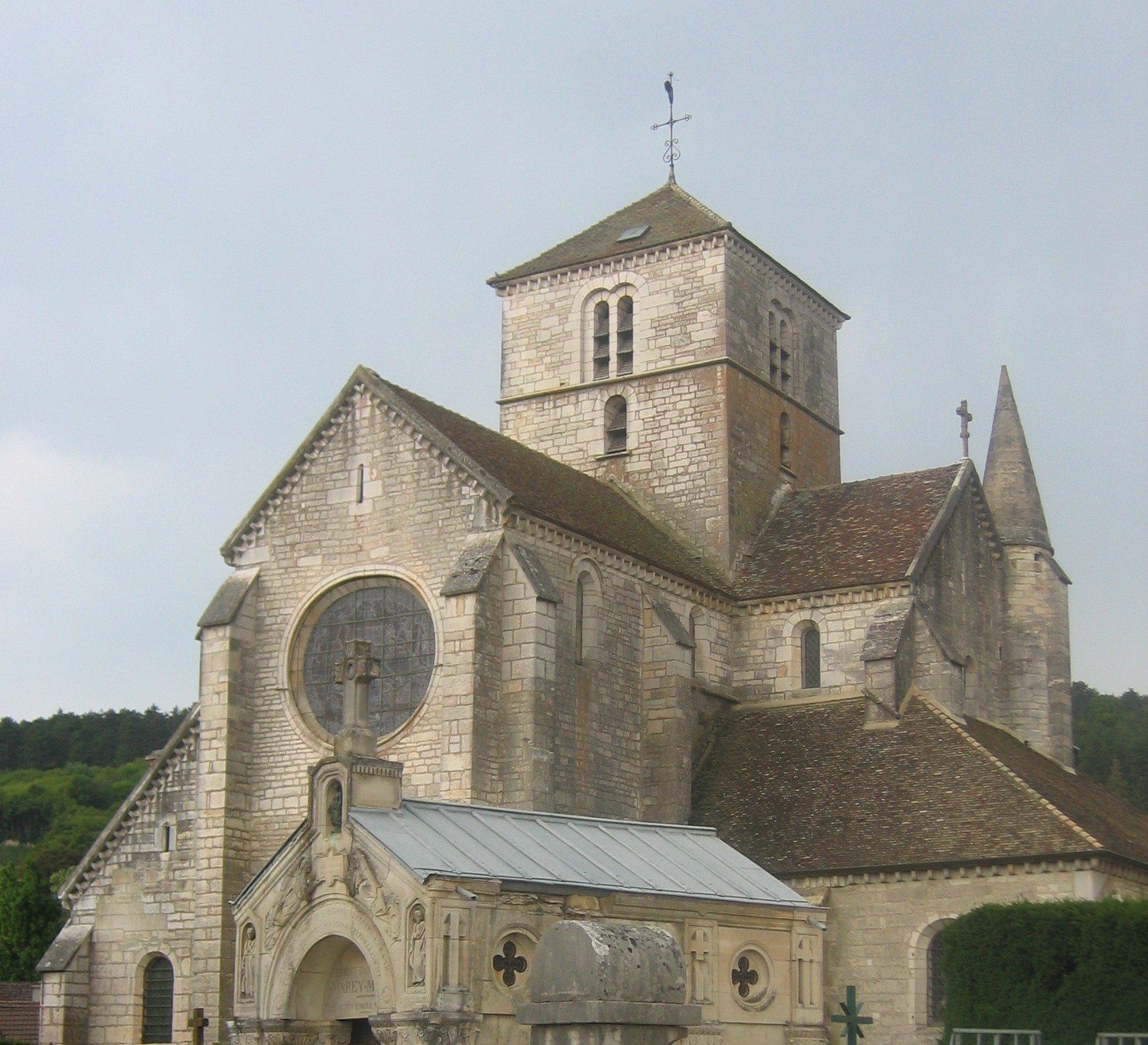 Eglise Saint-symphorien, Nuits-Saint-Georges, Bourgogne, France.